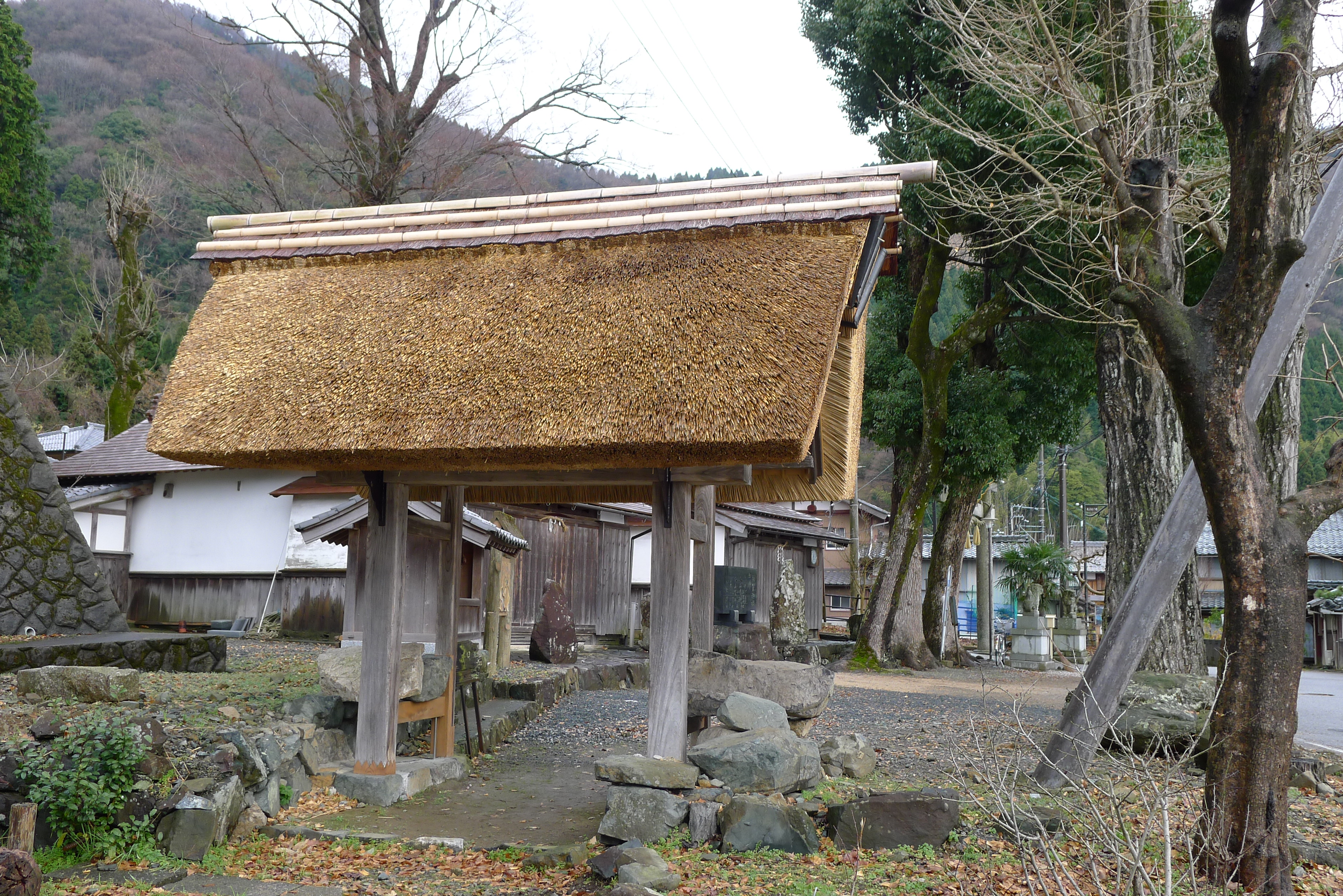 「菅浦の湖岸集落景観」：西の四足門